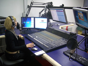 Studio de la 1Ere web radio de france